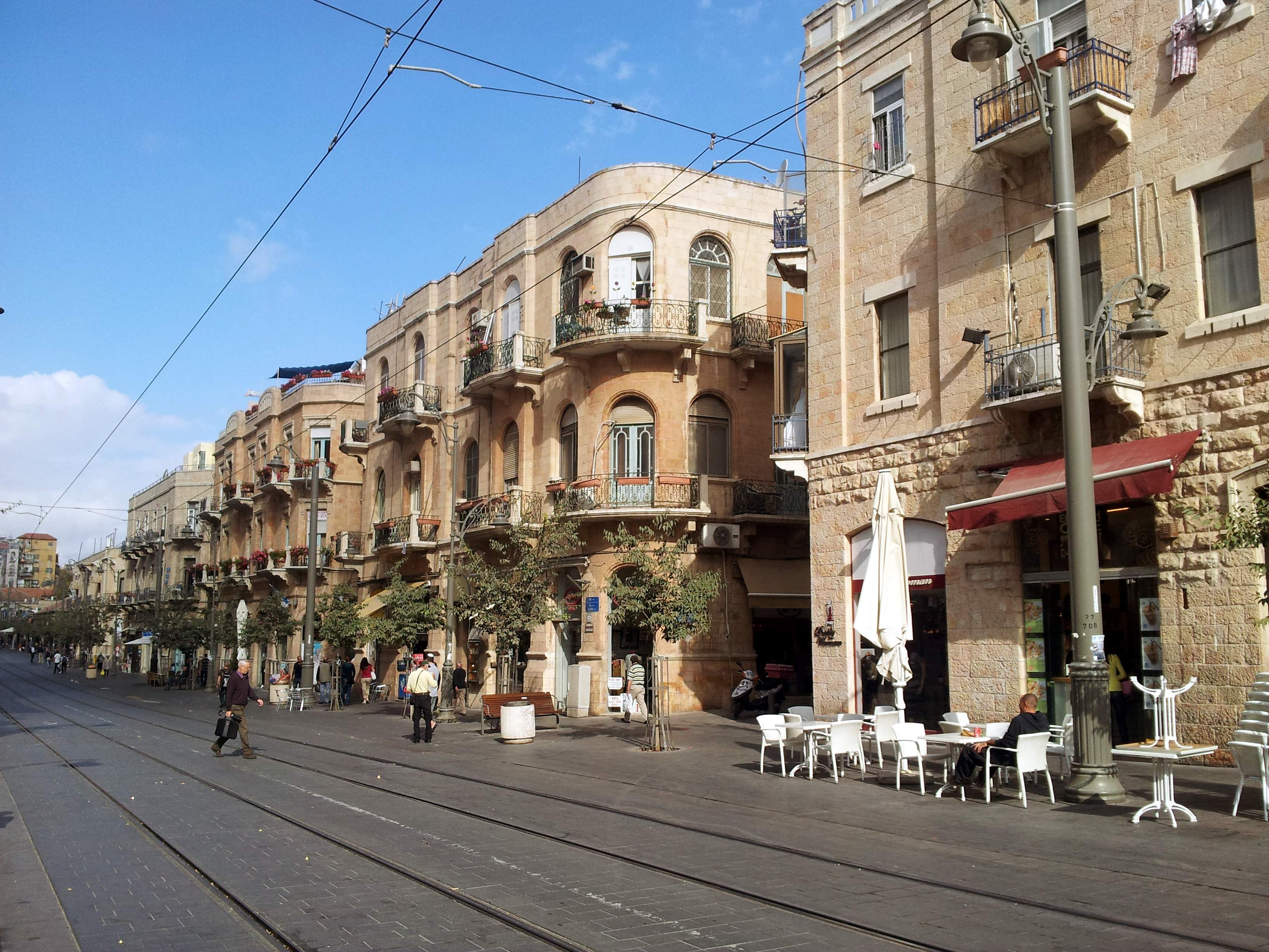 Jaffa Road, Jerusalem